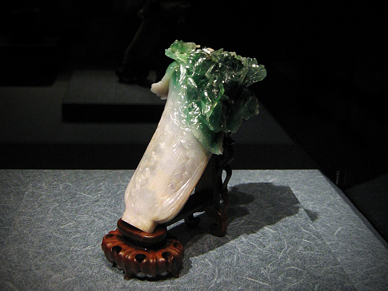 翠玉白菜；拍攝於台北故宮博物院，當時展廳內尚可攝影。